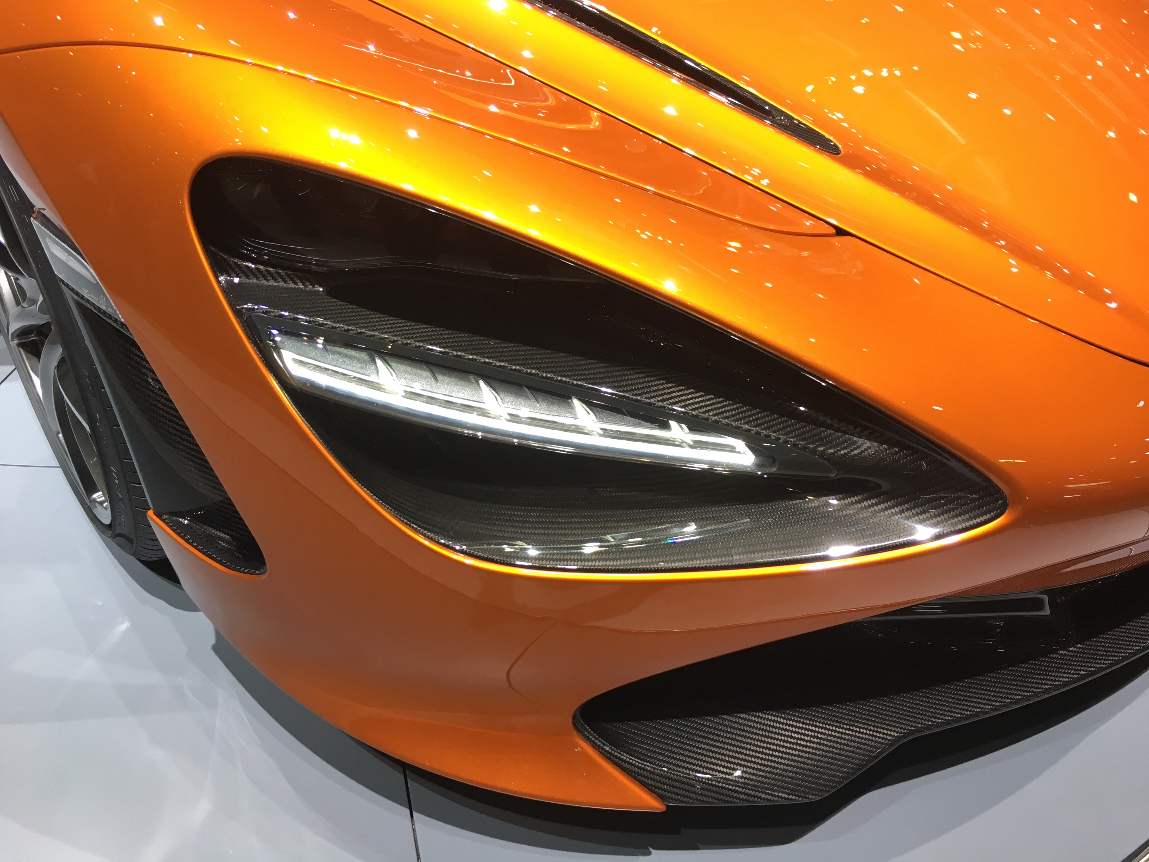 Geneva Auto Salon 2017